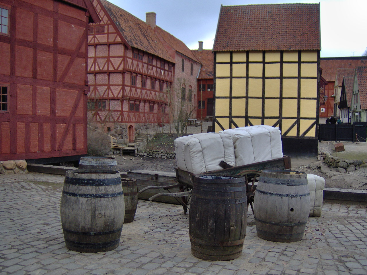 den-gamle-by-8